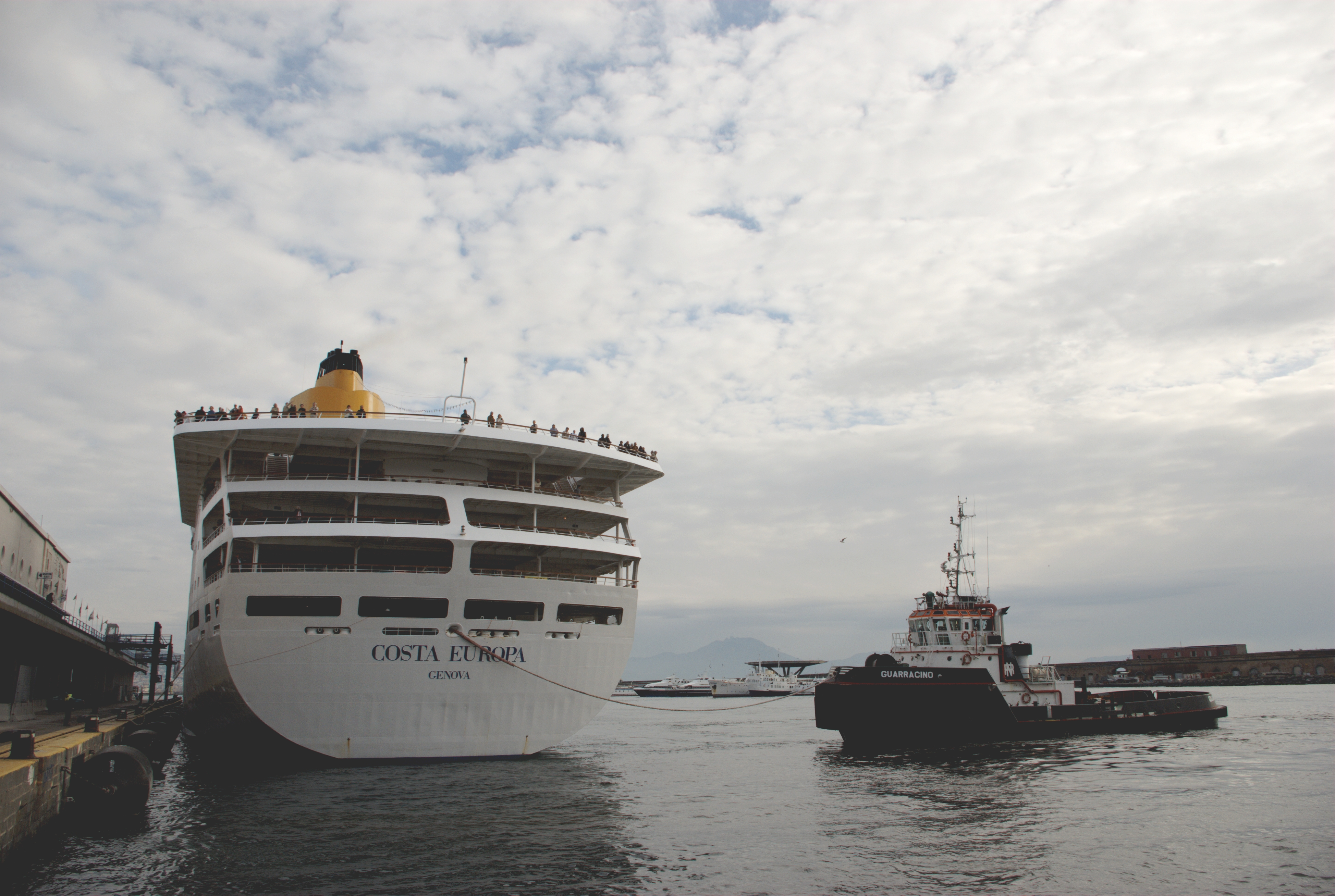 La nave da crociera Costa Europa mentre effettua manovre d'attracco al Molo Beverello di Napoli trainata da un rimorchiatore. Autore foto: Roberto De Martino